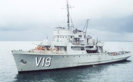 Corveta Caboclo (V-19) da Marinha do Brasil.